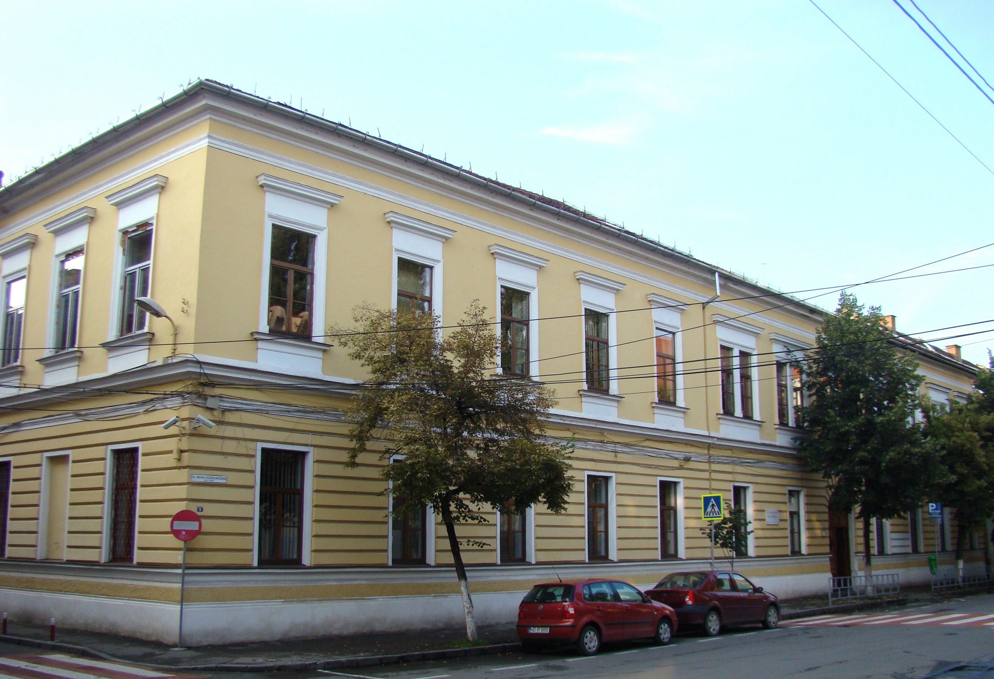 Liceul „Emil Racoviță”